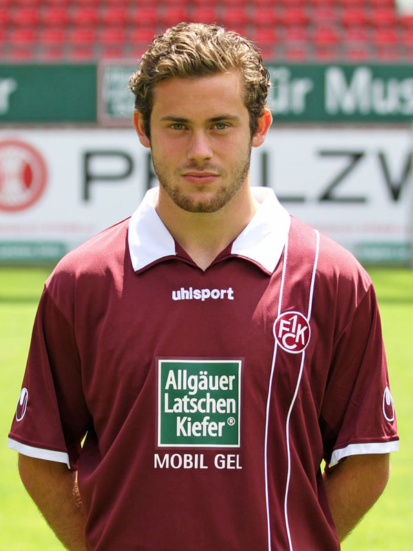 Steven Zellner, Fußballspieler